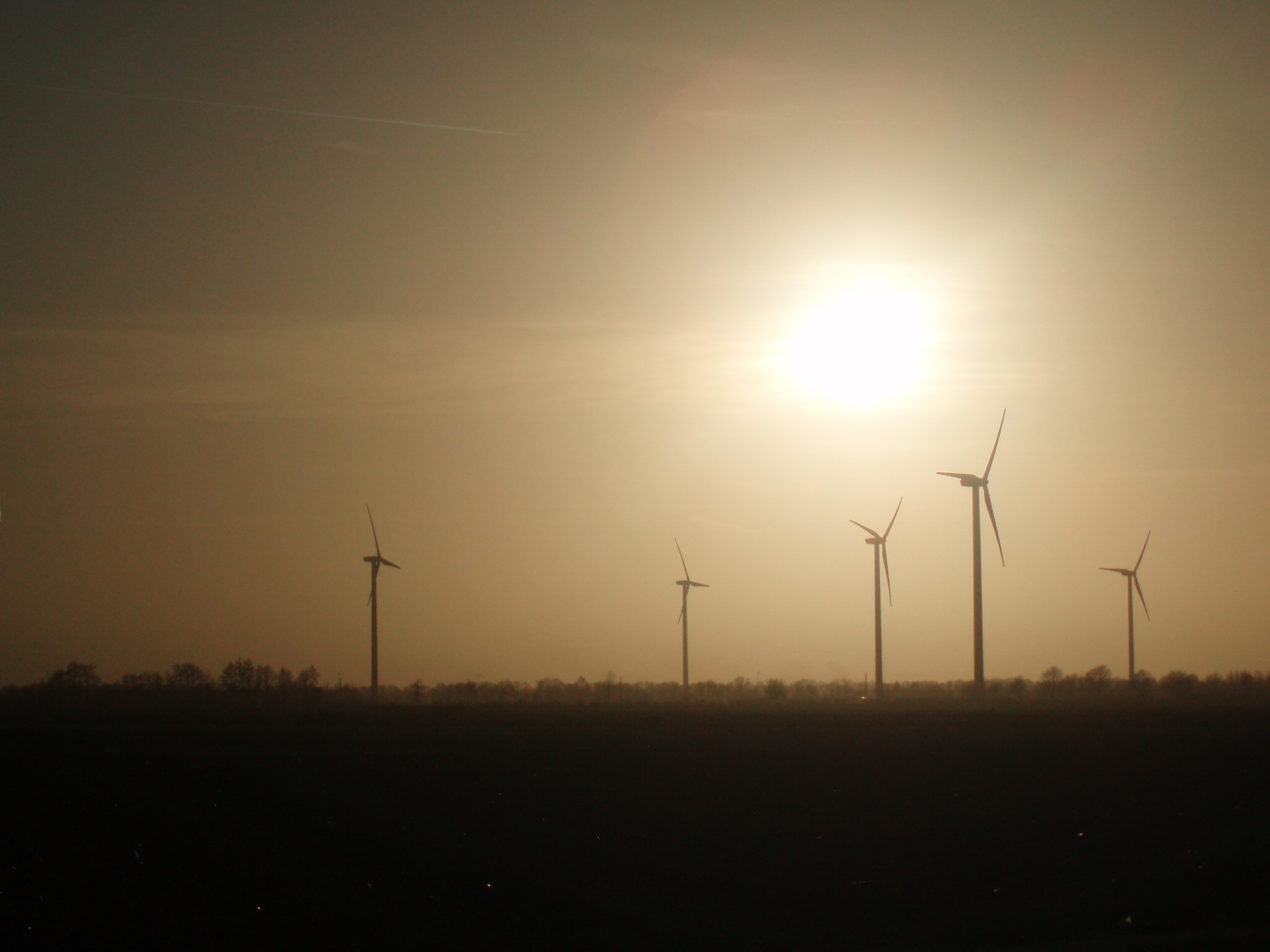 Windmolens op de grens tussen Nederland en Duitsland, Coevorden en Emlichheim. Foto genomen vanaf de N863.